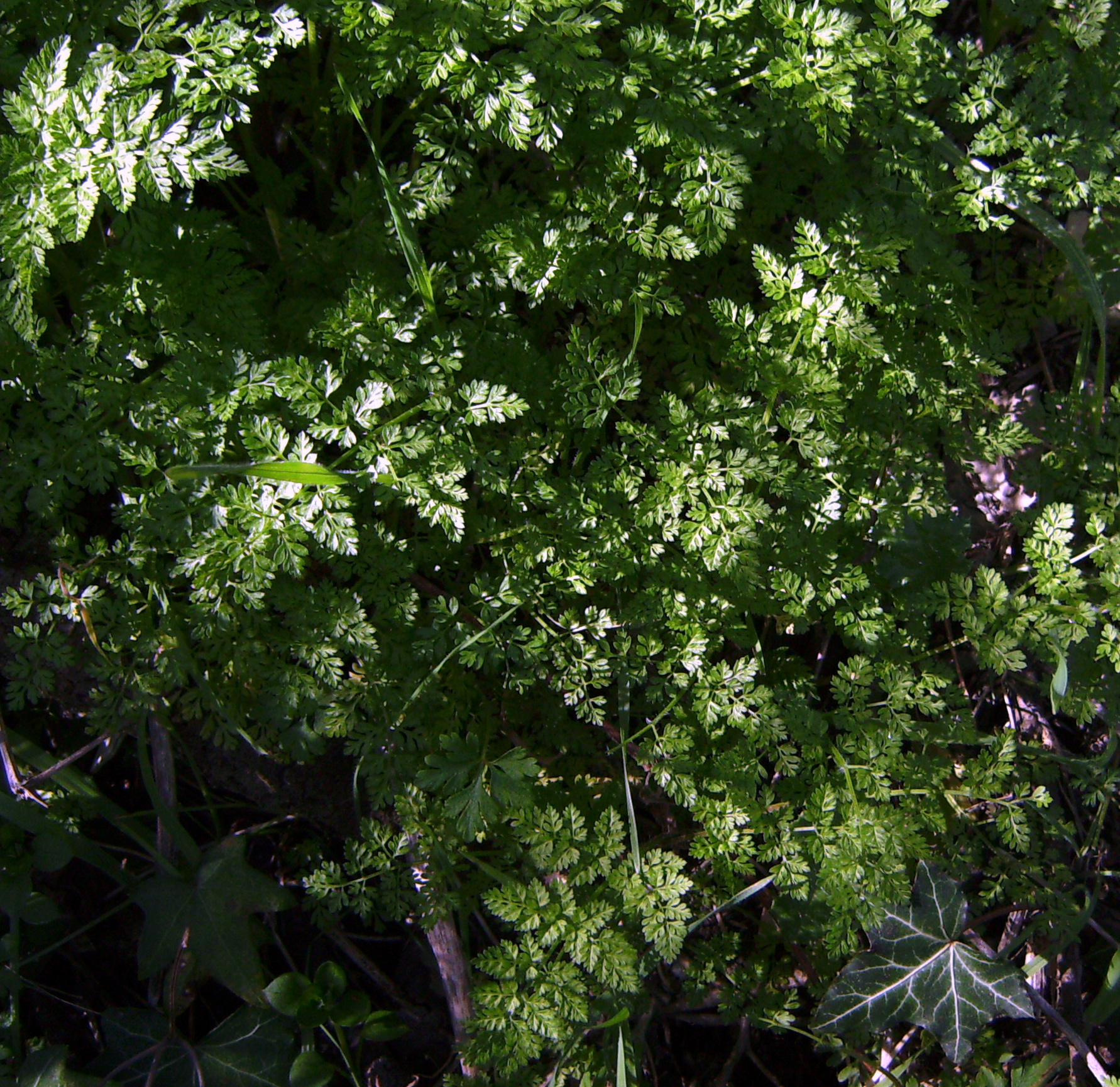 Fulles de julivert de muntanya (Peucedanum oreoselinum) a Castelltallat, Bages